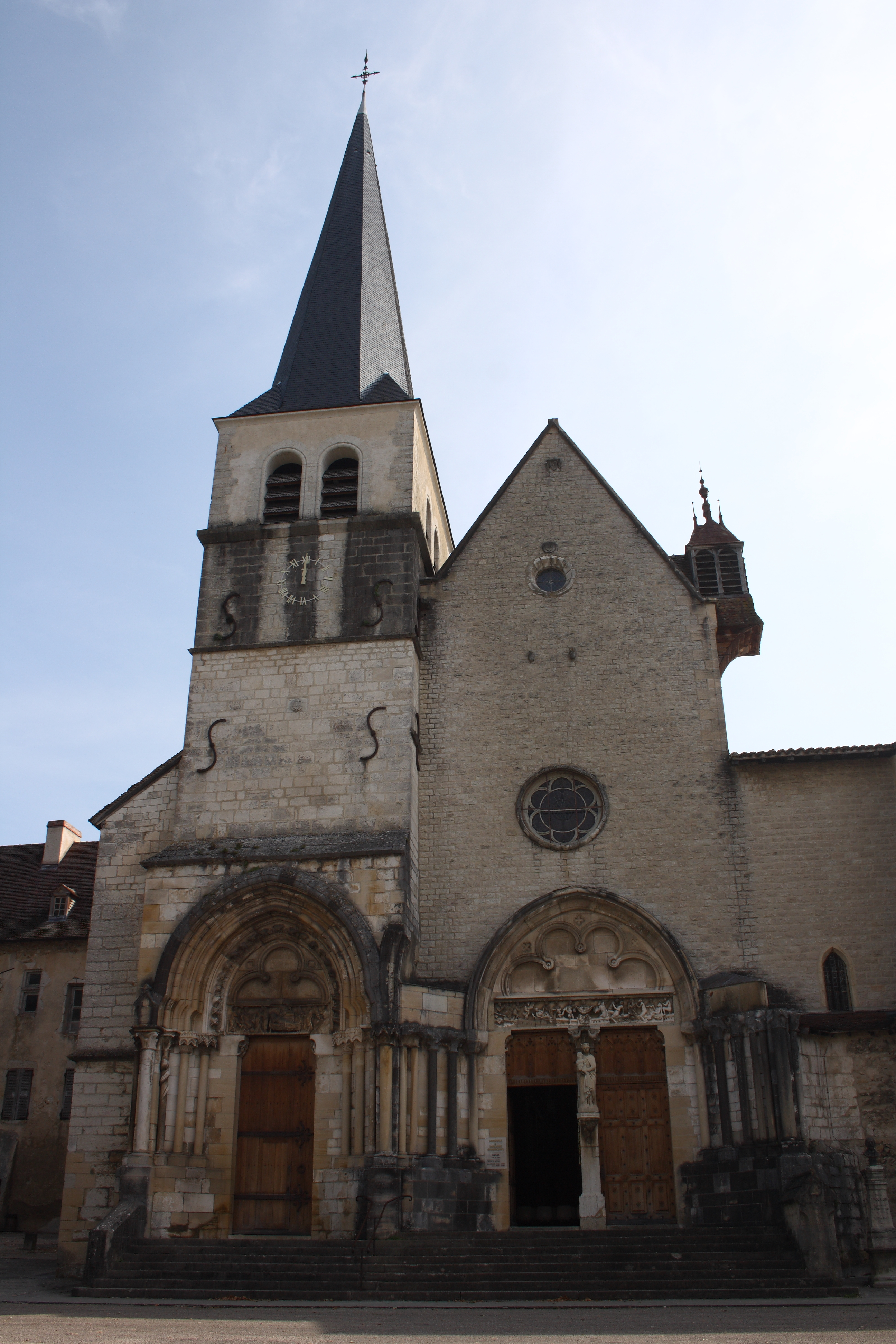 Ehemalige Abteikirche Notre-Dame in Ambronay, einer Gemeinde im Département Ain in der französischen Region Rhône-Alpes, Eingangsfassade